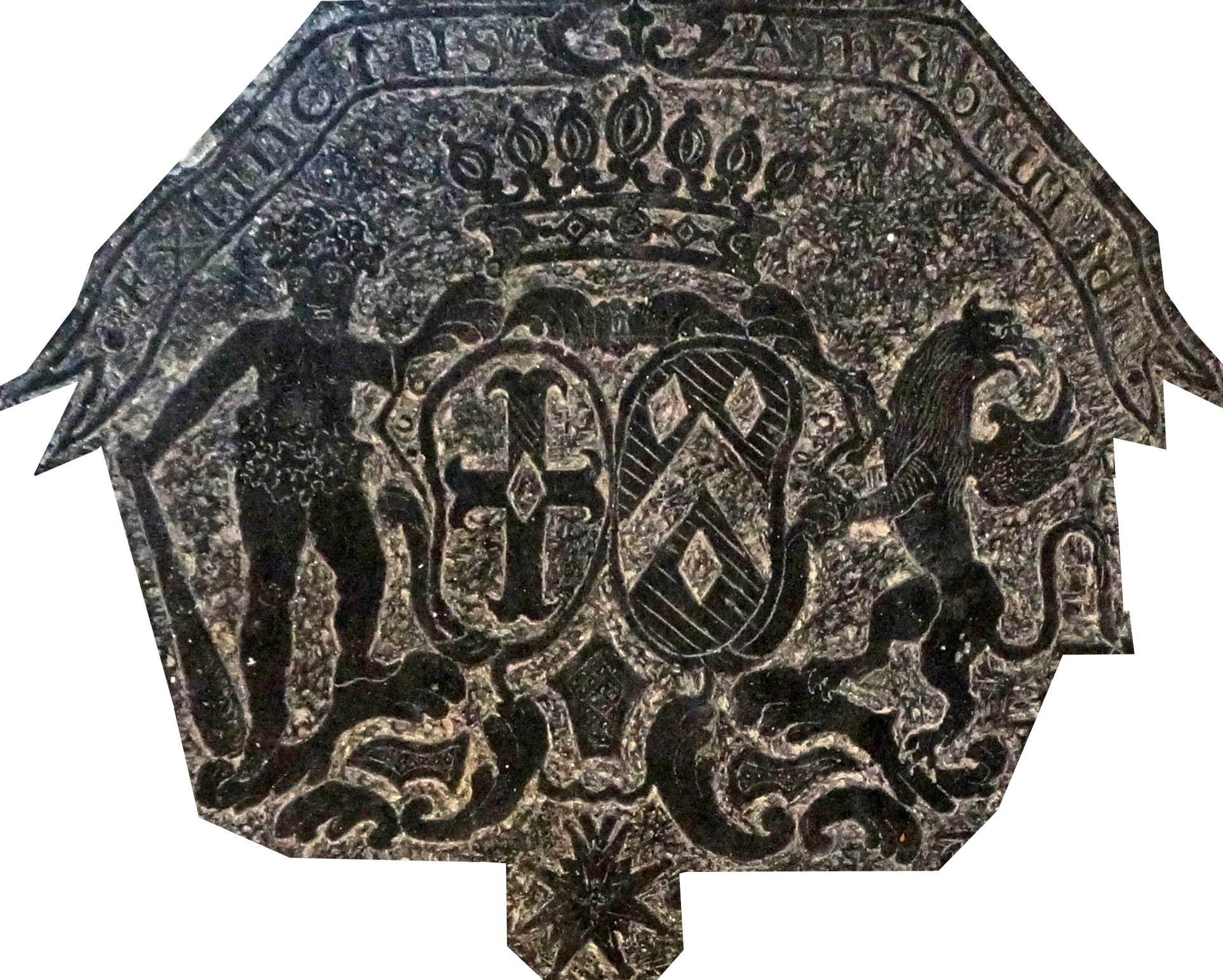 Village de Recy dans la Marne.